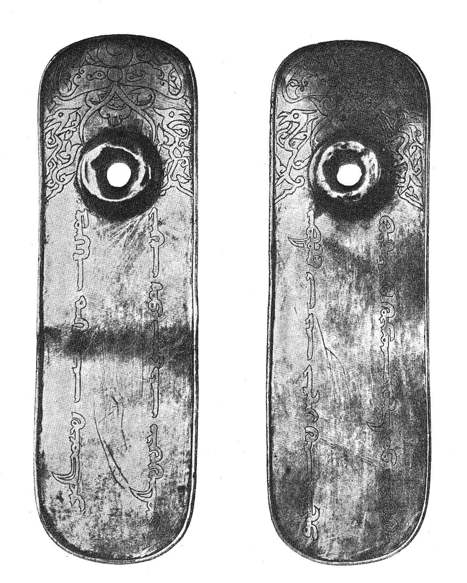 Пайцза Абдуллах-хана (1361—1370). Найдена в селе Грушевка близ г. Никополя Екатеринославской губернии Российской империи в 1845 или 1848 году.